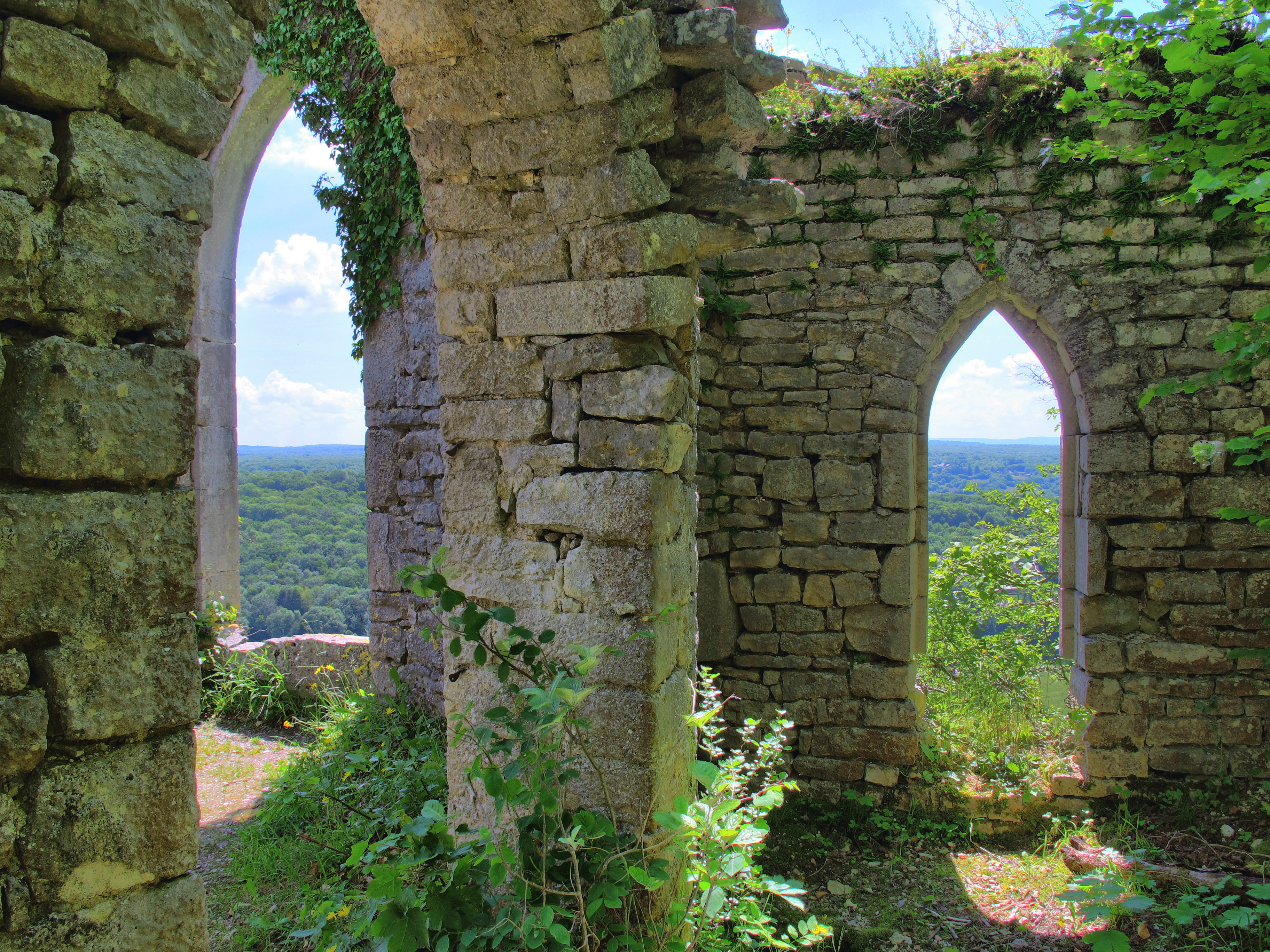 Château de Charencey (Inscrit) .